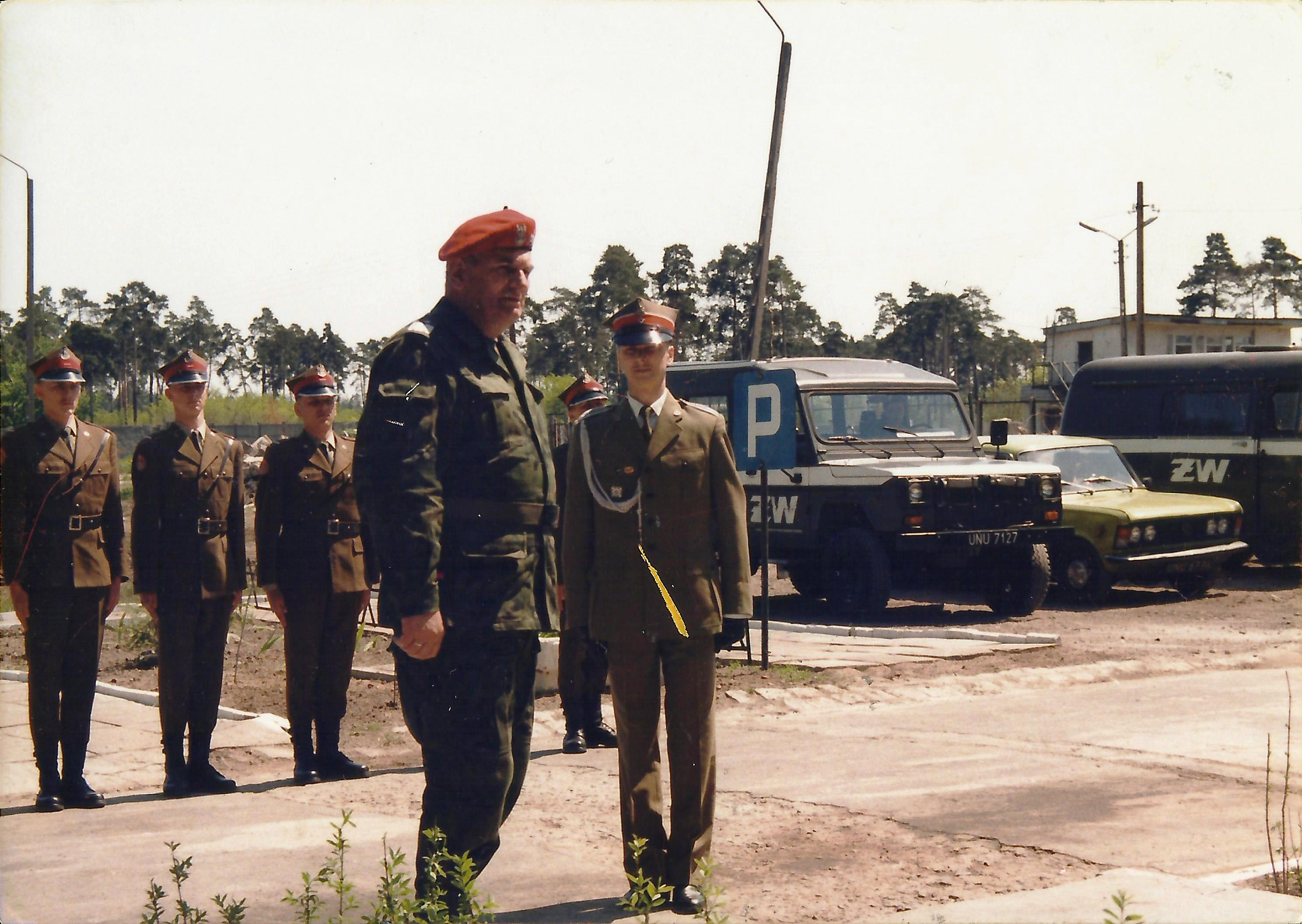 Komendant główny Żandarmerii Wojskowej, gen. bryg. Alfons Kupis w czasie oficjalnego otwarcia Placówki Żandarmerii Wojskowej w Świętoszowie. Obok komendanta głównego ŻW stoi ówczesny komendant Placówki, mł. chor. Marek Ulita. W tle drużyna żandarmerii PŻW Świętoszowie i pojazdy służbowe.